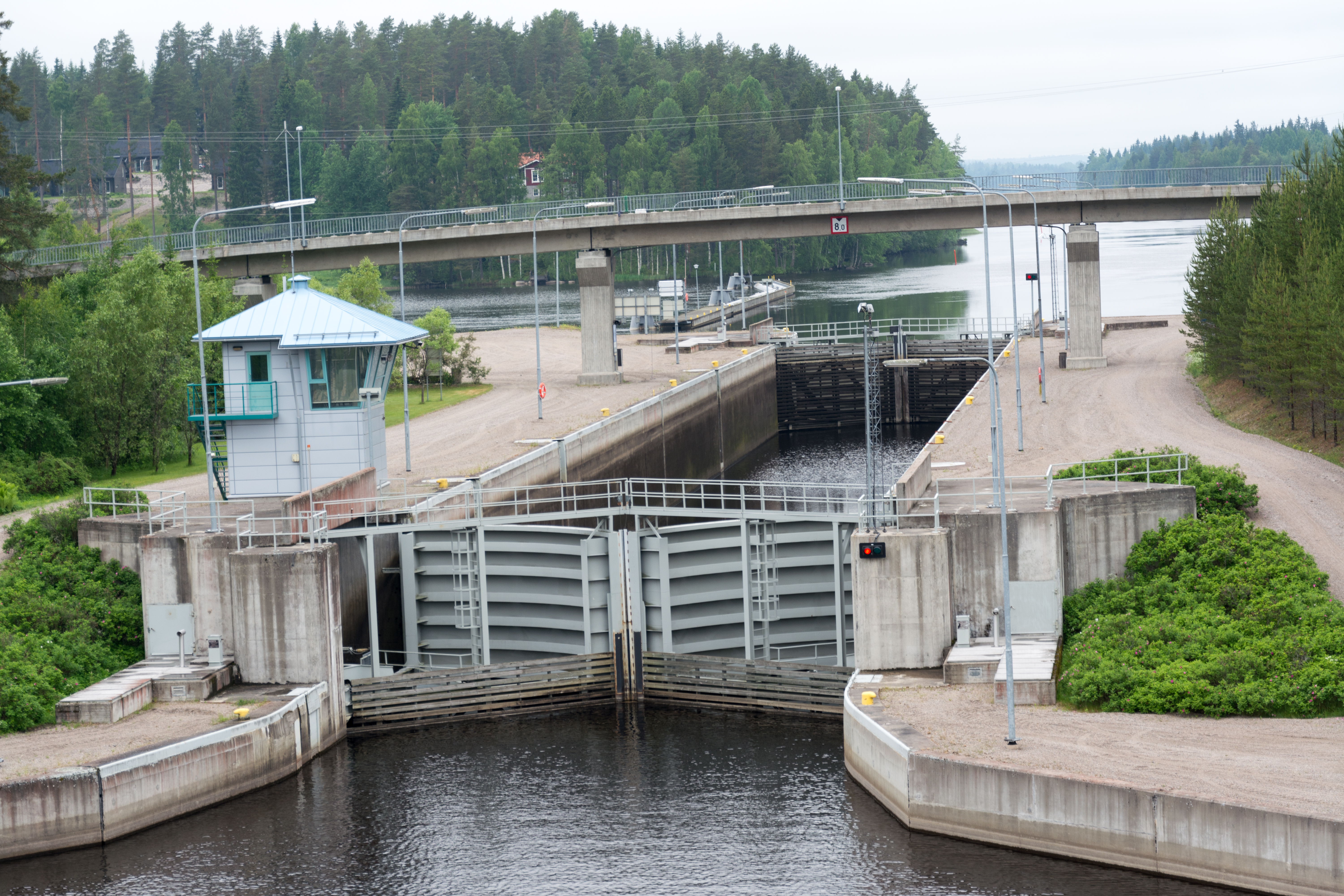 Kuusan sulku Laukaassa